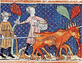 Paysans labourant, Bibliothèque royale Espagne, XIIIe siècle)